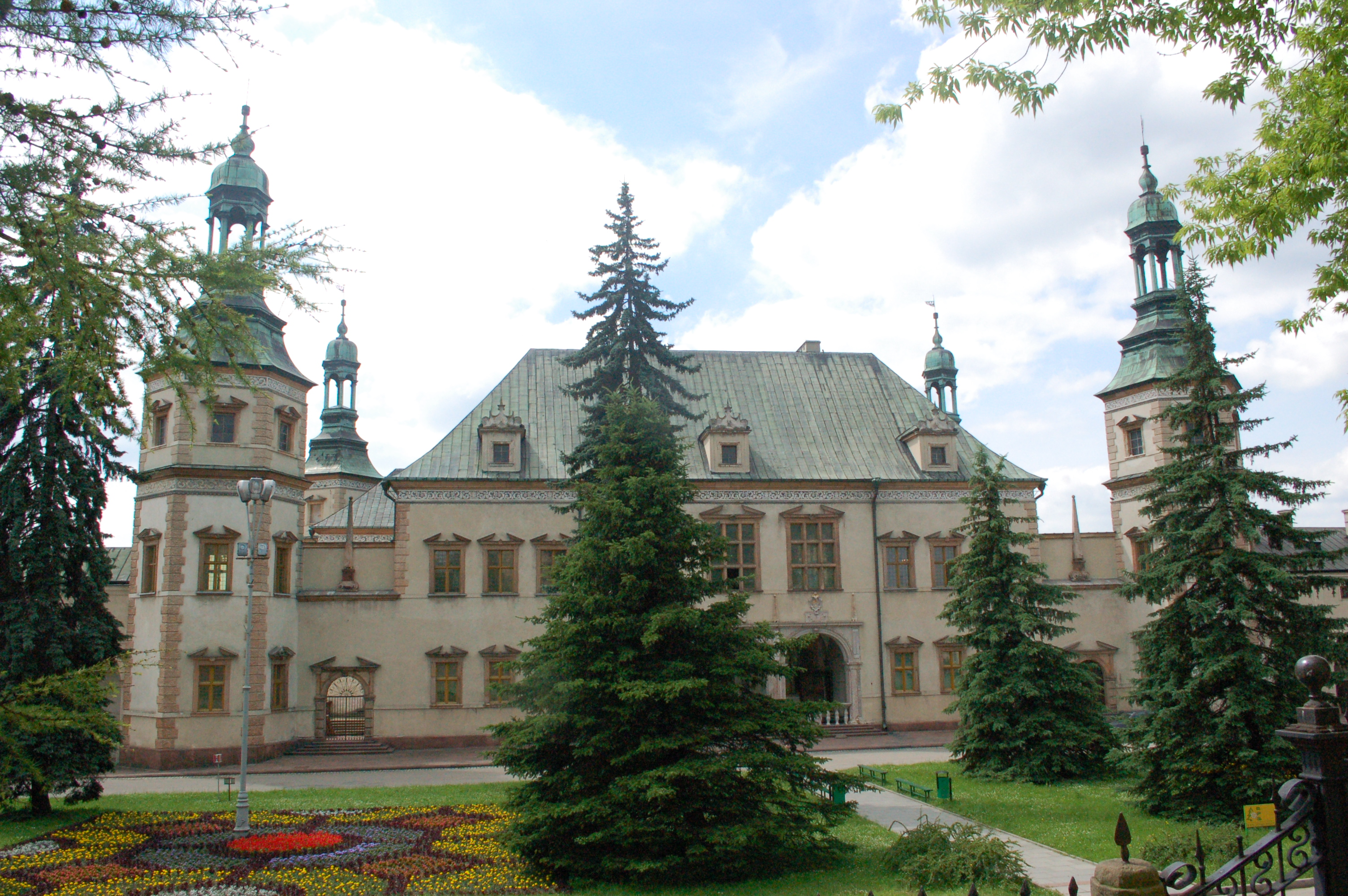 Ehemaliger Bischofspalast in Kielce